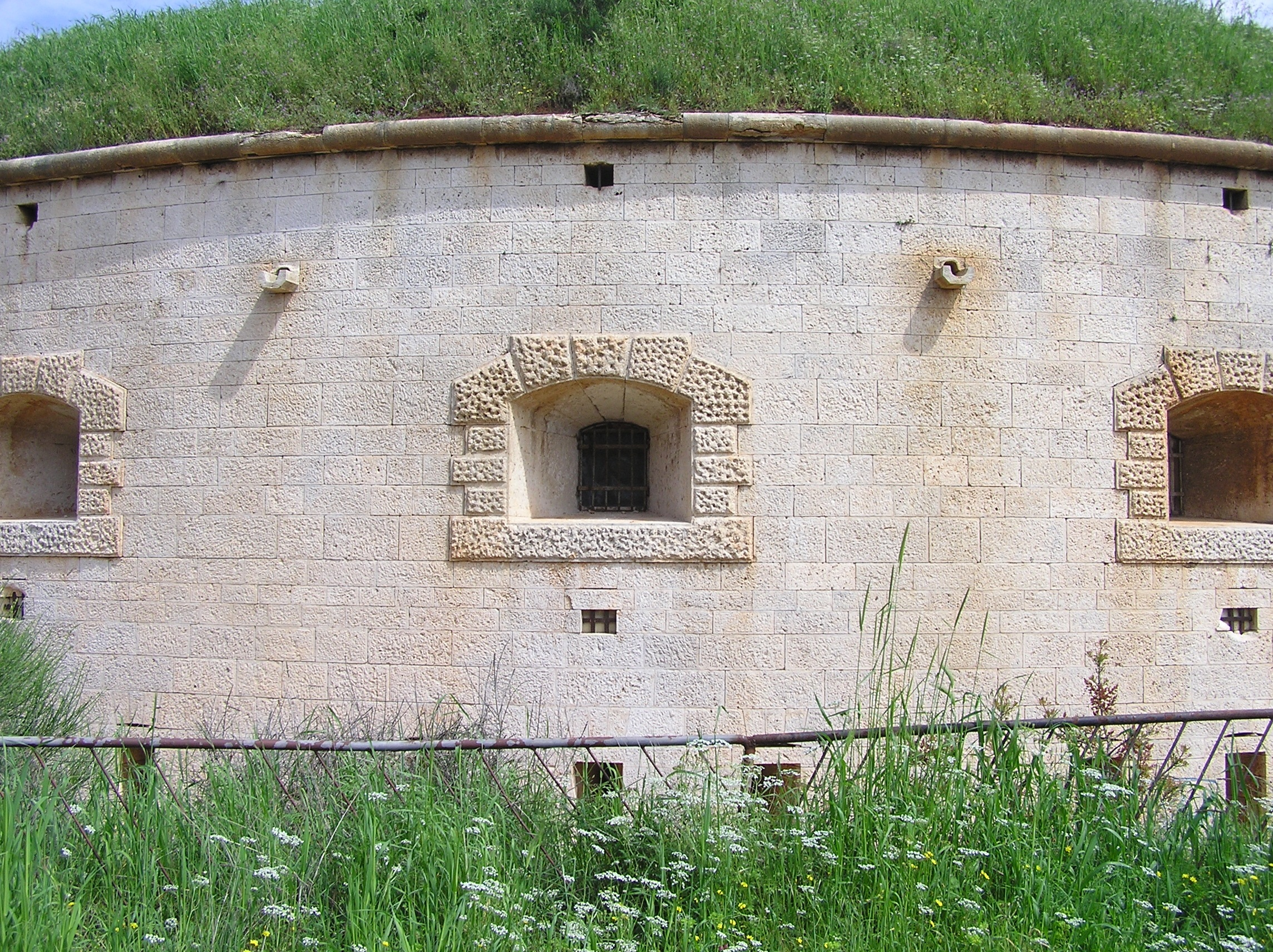 self-made